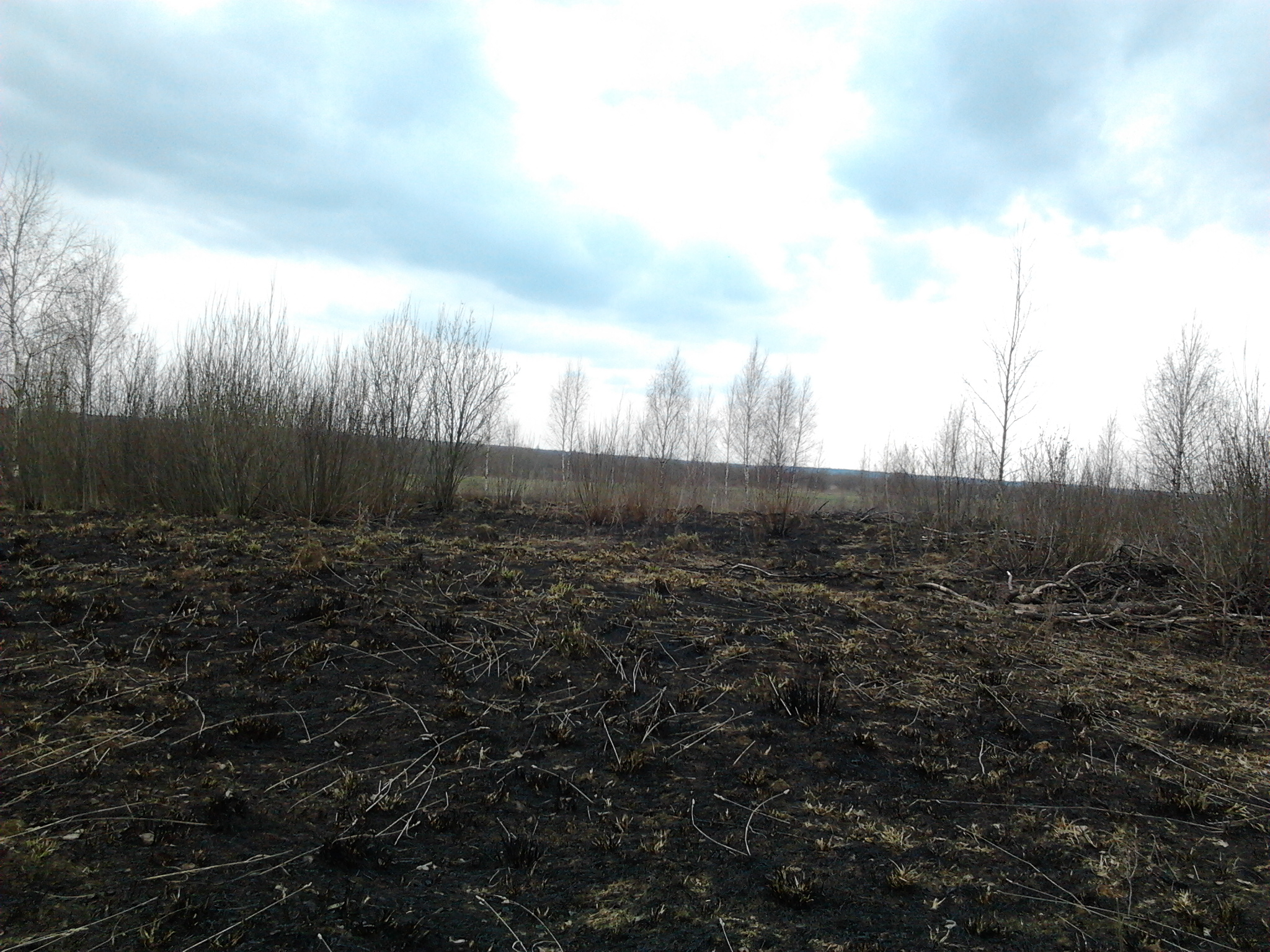 После весенних пожаров.